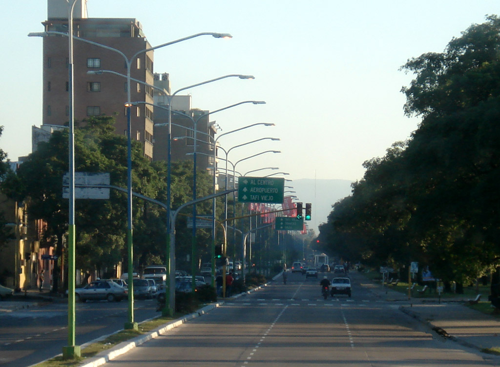 Avenida Soldati en San Miguel de Tucumán.